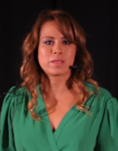 Ximena Valero lors du TEDxTijuana le 21 octobre 2014.